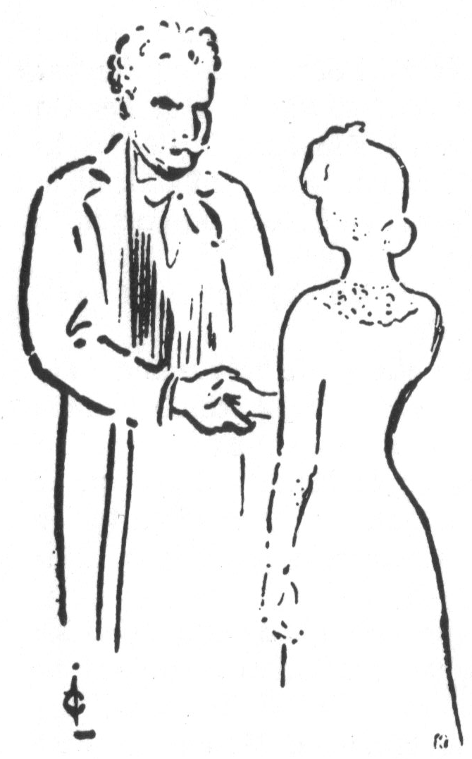 Fra en oppsetning av Gunnar Heibergs «Kjærlighet til næsten». Fra venstre: Egil Eide som Brodersen, Johanne Dybwad som Cornelia.